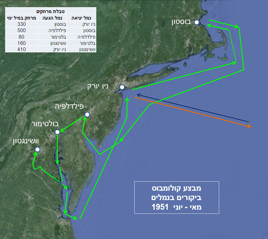 1951 נתיבי הפלגה בין נמלי ארצות הברית במבצע קולומבוס אפריל - יוני .